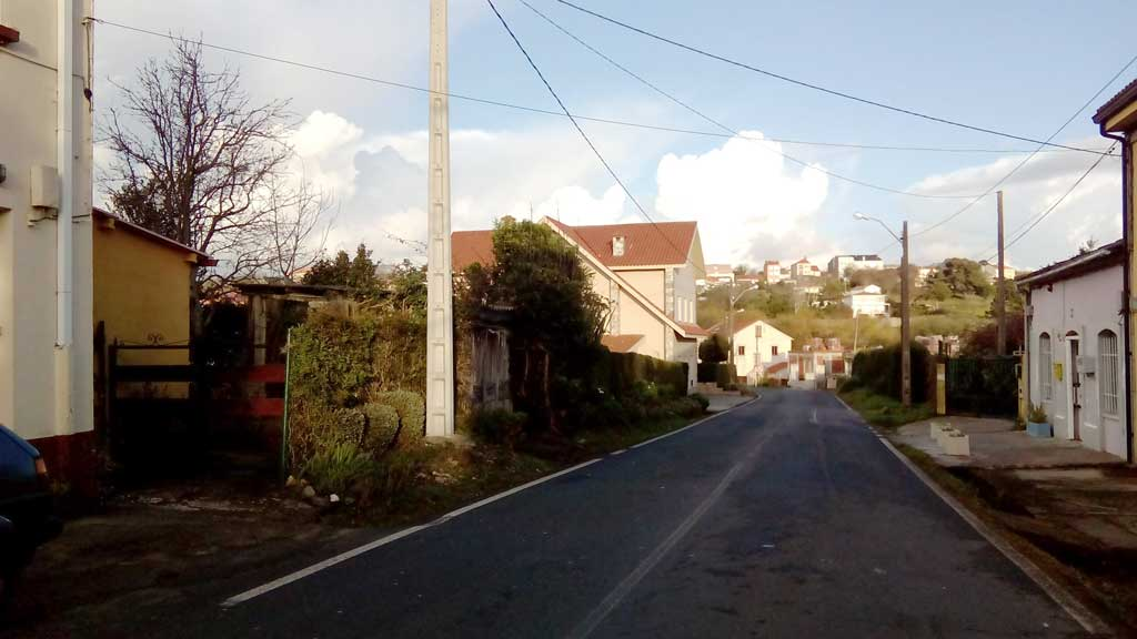 Vista do Bosque, Ferrol.